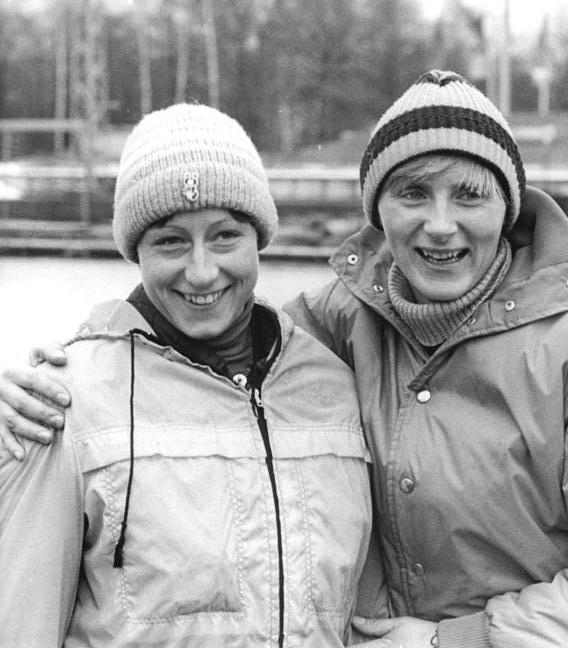 Sabine Becker, Christa Rothenburger ADN-ZB Thieme 15.12.79 Karl-Marx-Stadt: DDR-Meisterschaften im Eisschnellauf- Die erfolgreichsten Läuferinnen dieser Meisterschaften waren Christa Rothenburger vom SC Einheit Dresden (links, Meisterin über 500m) und Sabine Becker vom SC Dynamo Berlin, sie holte sich über 3000m ihren zweiten Meistertitel.